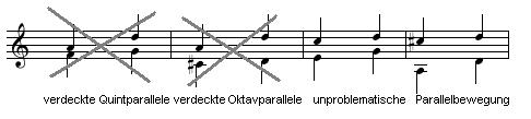 Verdeckte Parallelen